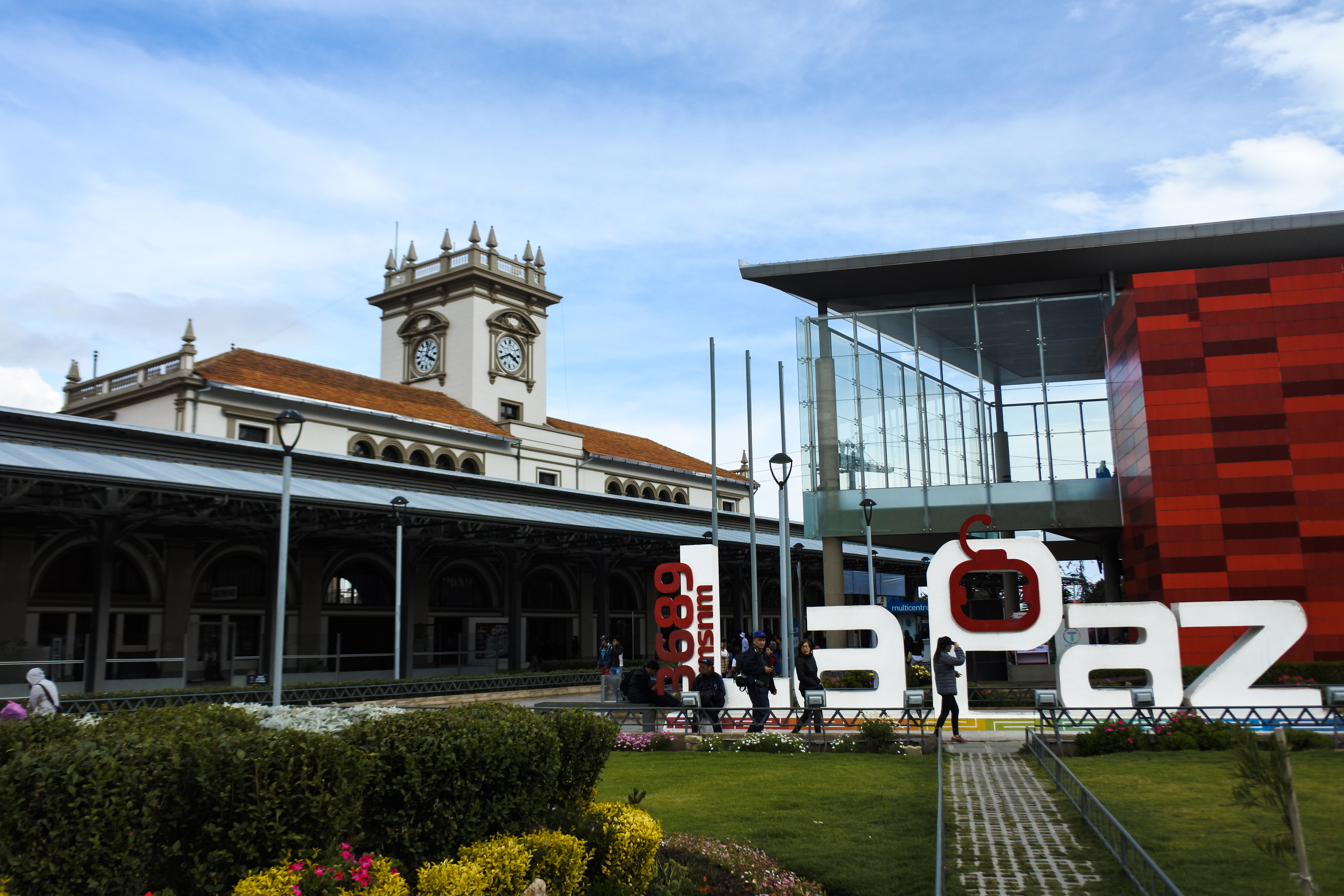 La antigua estación de ENFE junto a la nueva estación de la linea roja de Mi Teleférico en La Paz, Bolivia